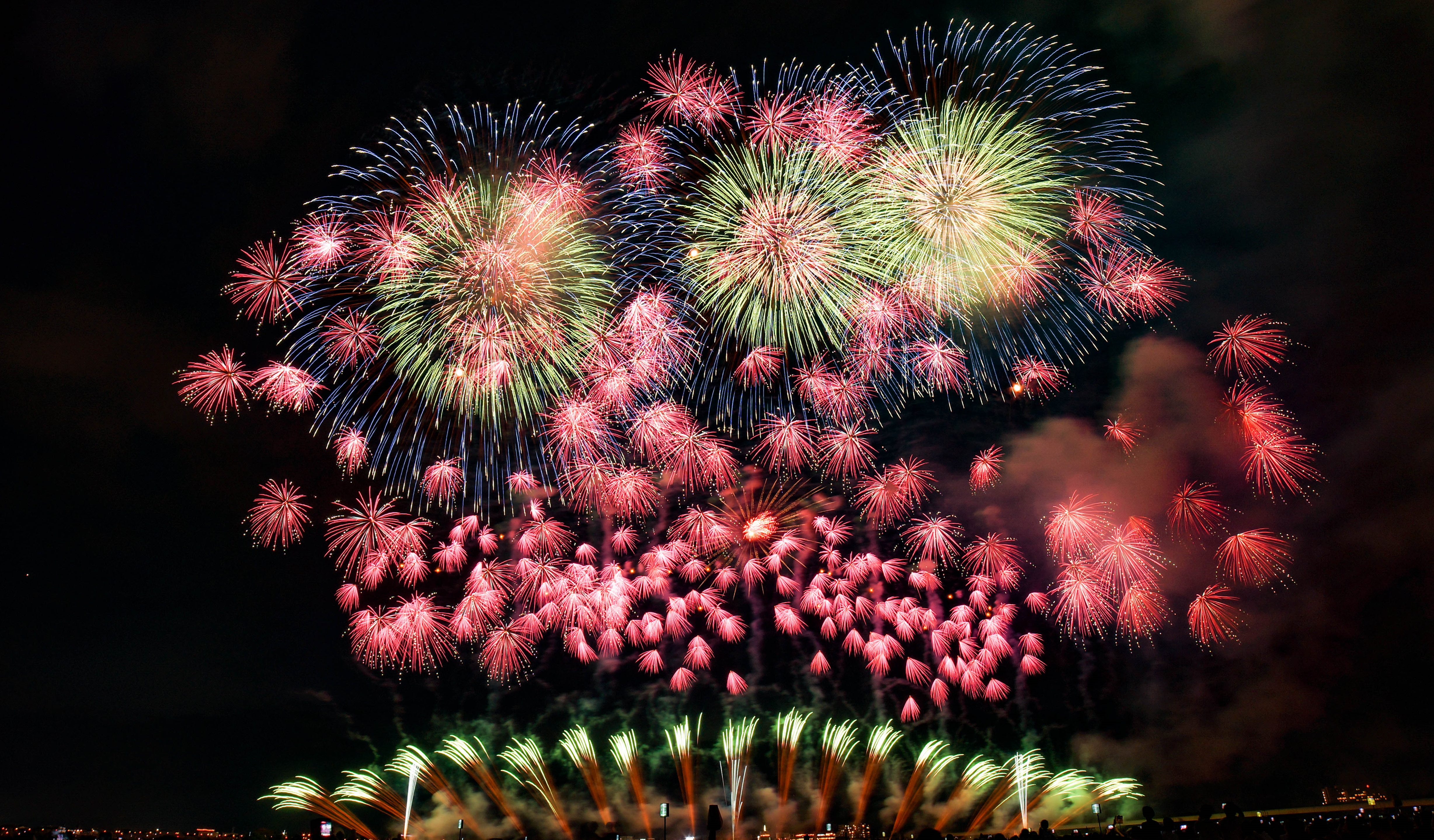 長岡まつり花火大会天地人花火 Sony SLT-A57